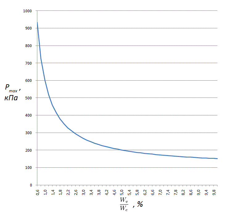 Соотношение максимального давления взрыва и отношения объема смеси и помещения, обеспечивающее безопасность помещения